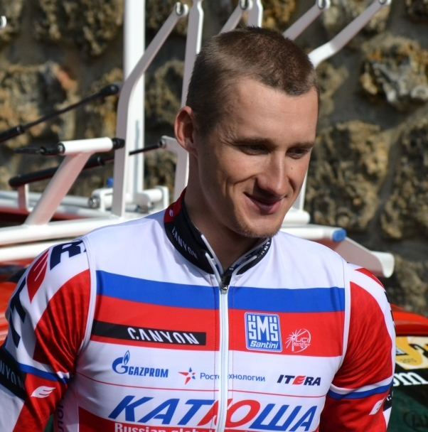 Gatis Smukulis à Paris-Nice 2013